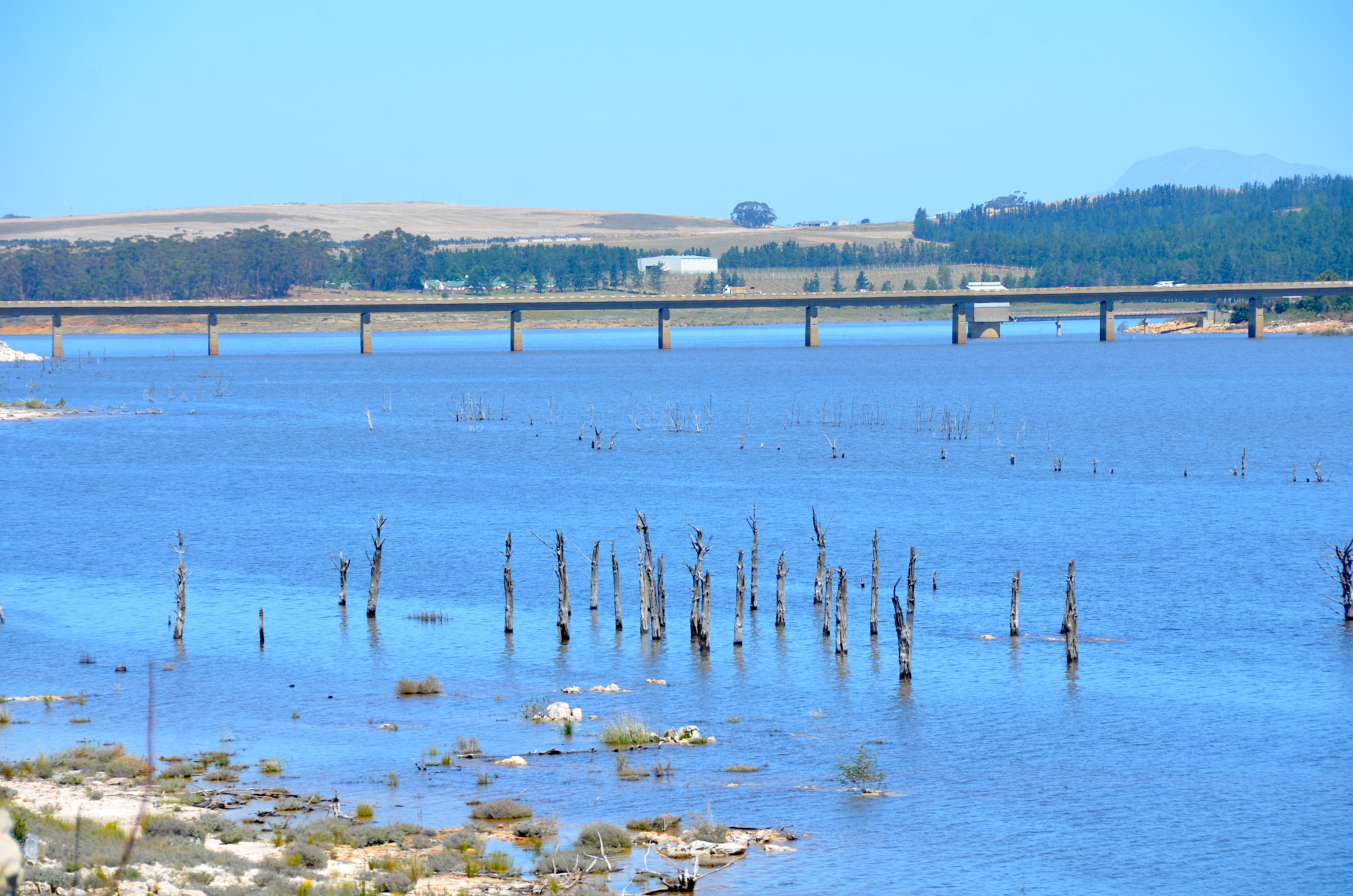 Regional Route 321 über den Theewaterskloof-Damm